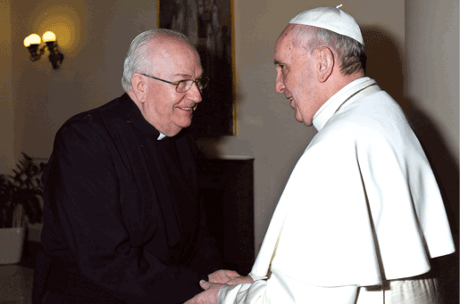 15 de octubre de 2013.- El Papa Francisco nombró el pasado 30 de agosto al P. Fernando Vérgez, L.C., Secretario general de la Gobernación del Estado de la Ciudad del Vaticano, y este martes 15 de octubre lo ha nombrado obispo, y le ha asignado la sede titular de Villamagna de Proconsolare.